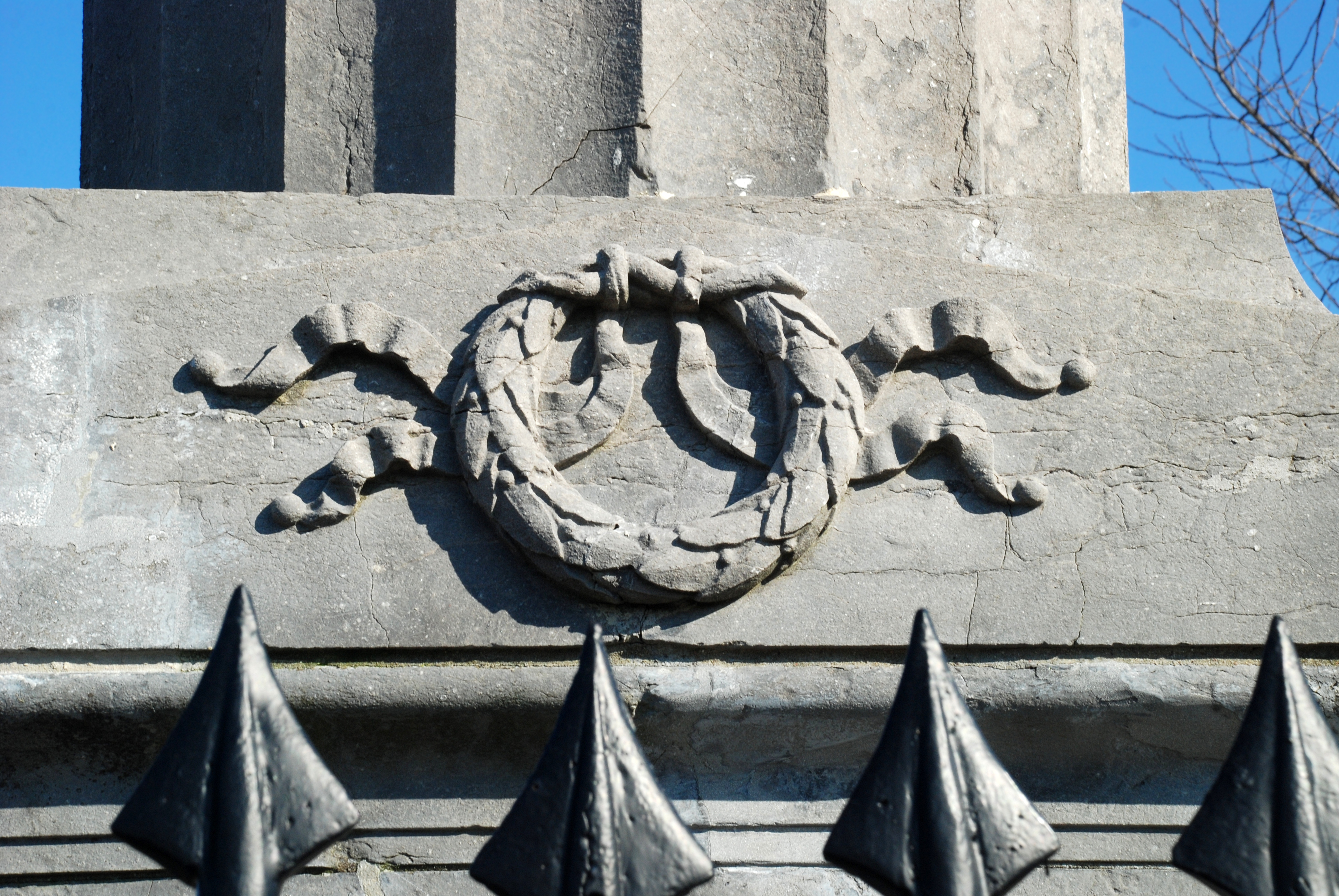 Belgique - Brabant wallon - Bataille de Waterloo - Monument Gordon